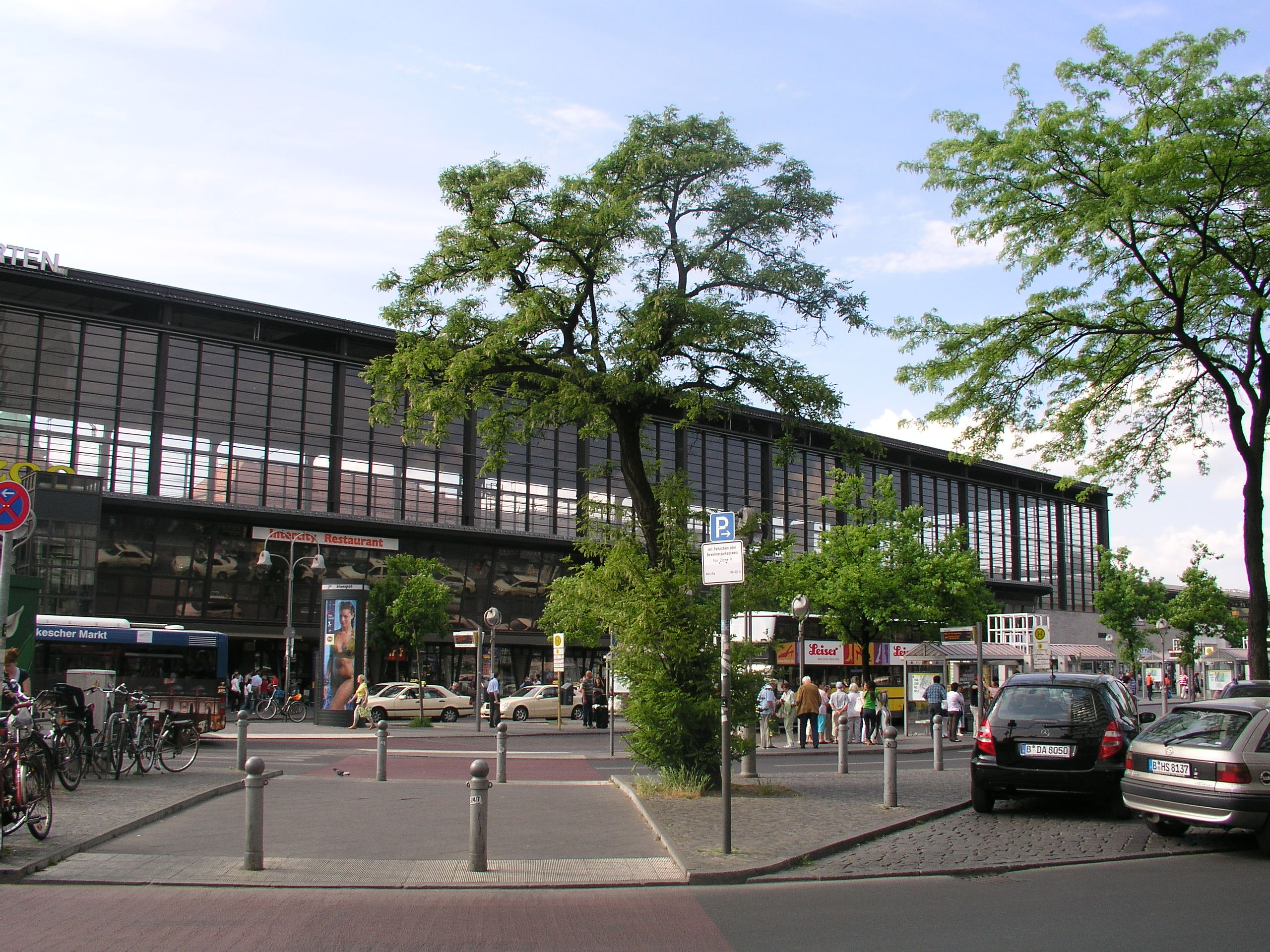 Hardenbergplatz (3), Blick auf den Bahnhof Zoologischer Garten